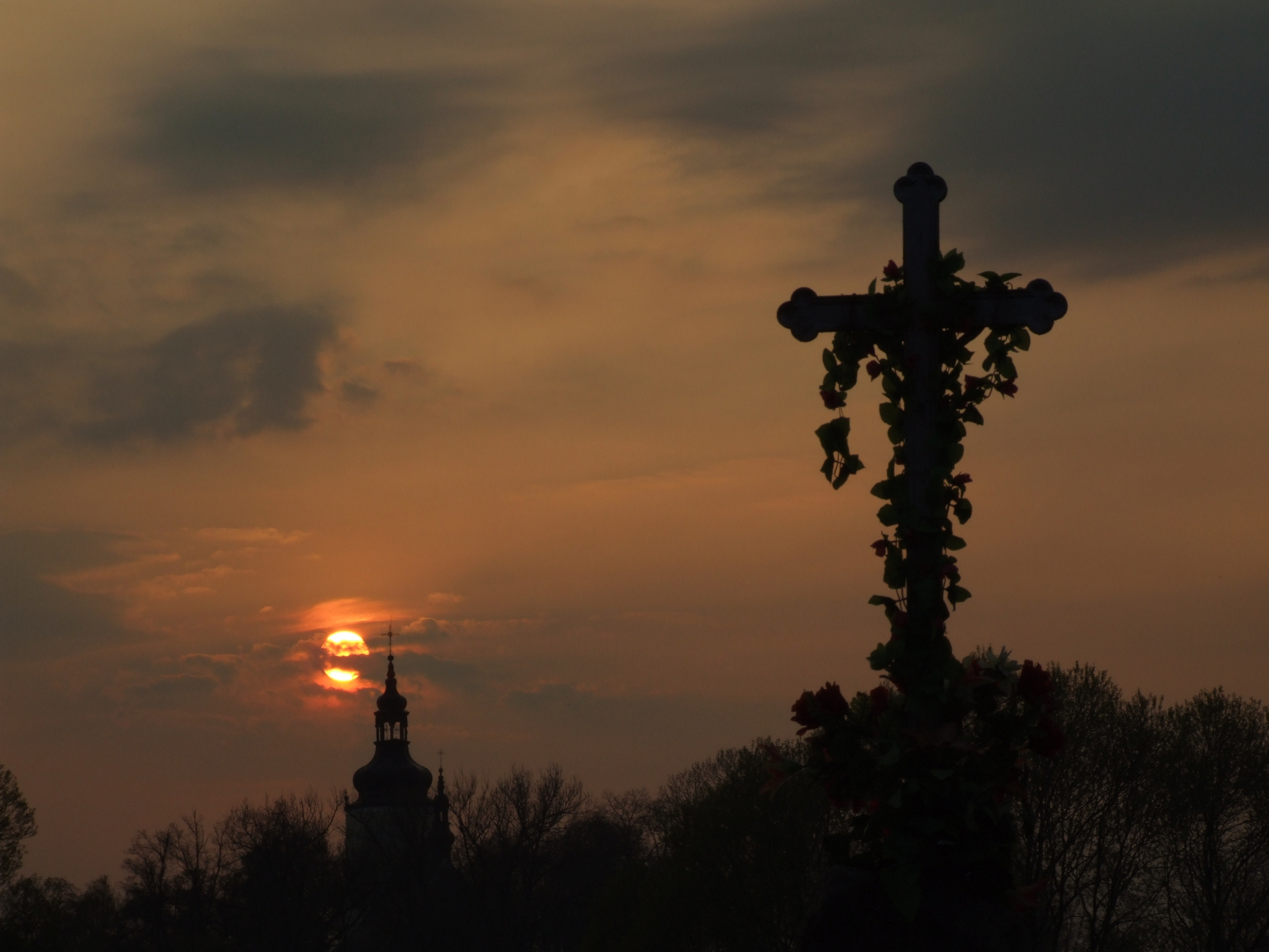 Kościół w Dankowie